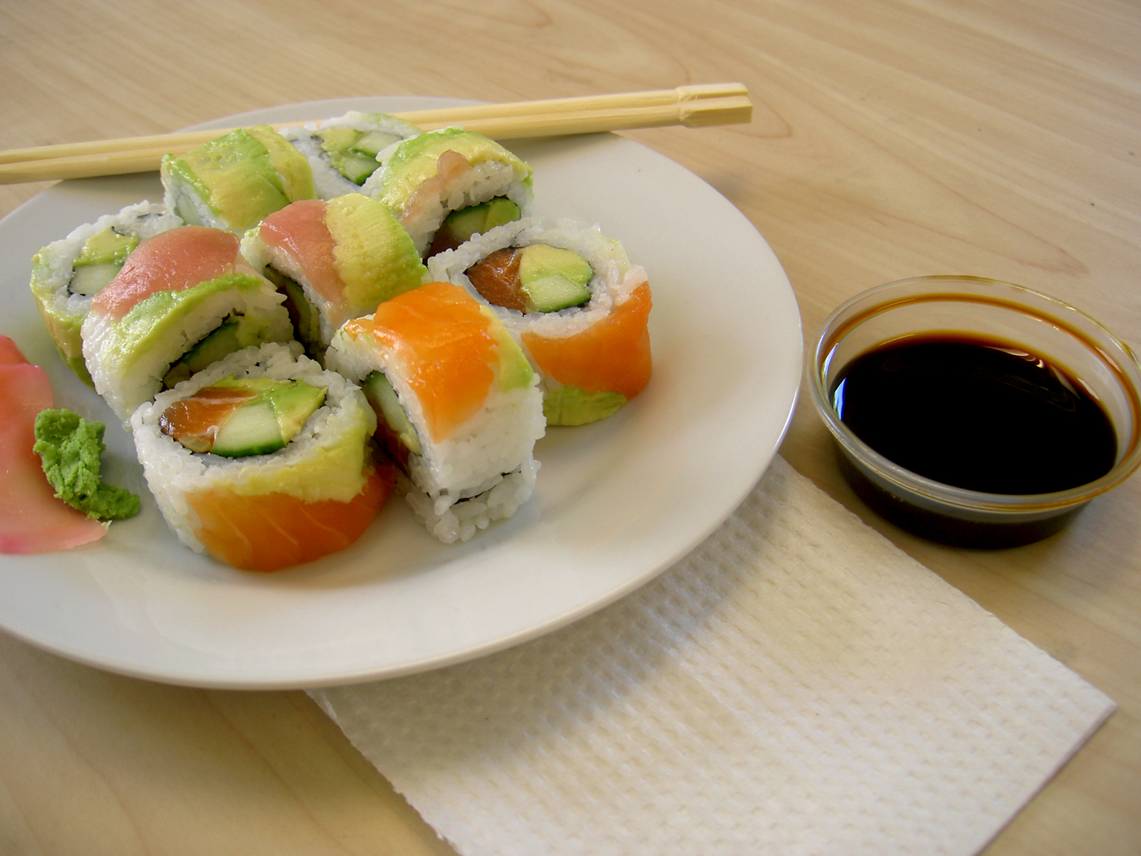 Maki and soy sauce